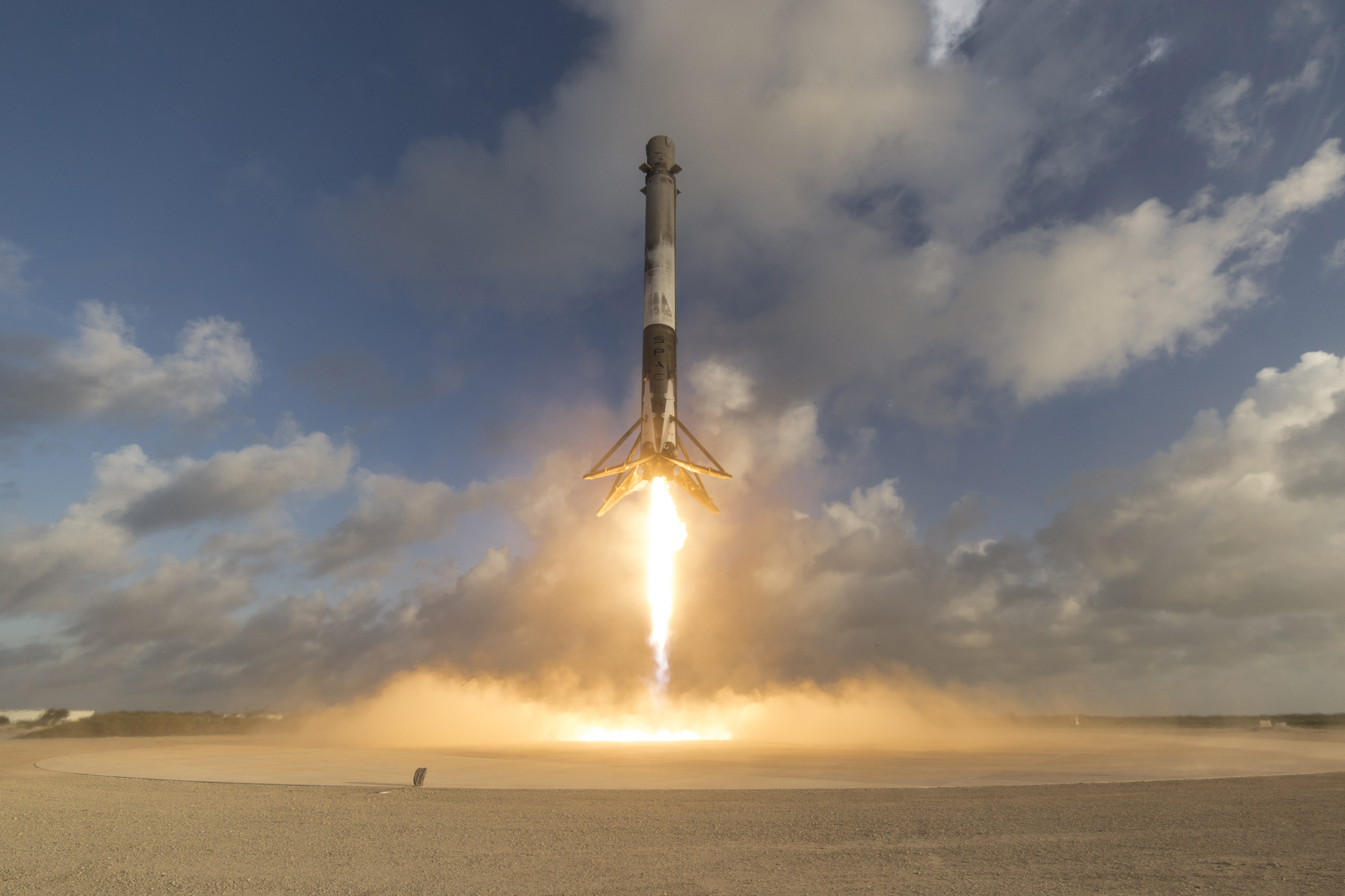 NROL-76 Mission